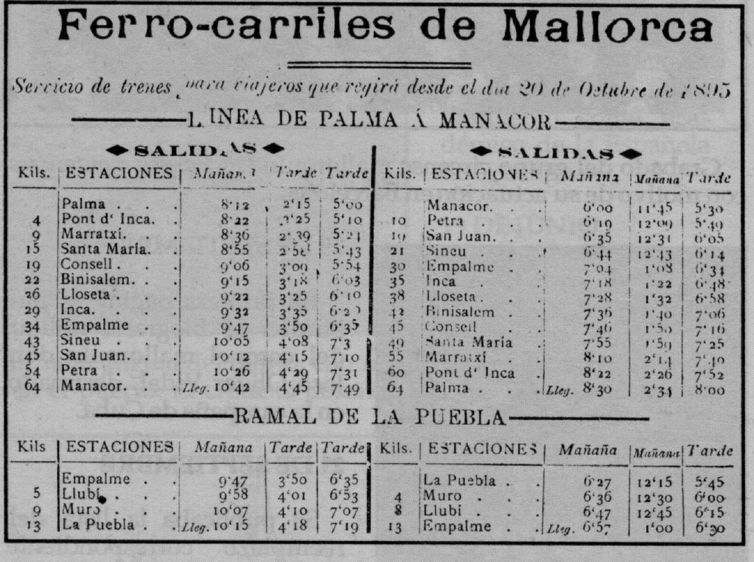 HORARIO DE FERROCARRILES DE MALLORCA, EN VIGOR DESDE EL 20 DE OCTUBRE DE 1895.